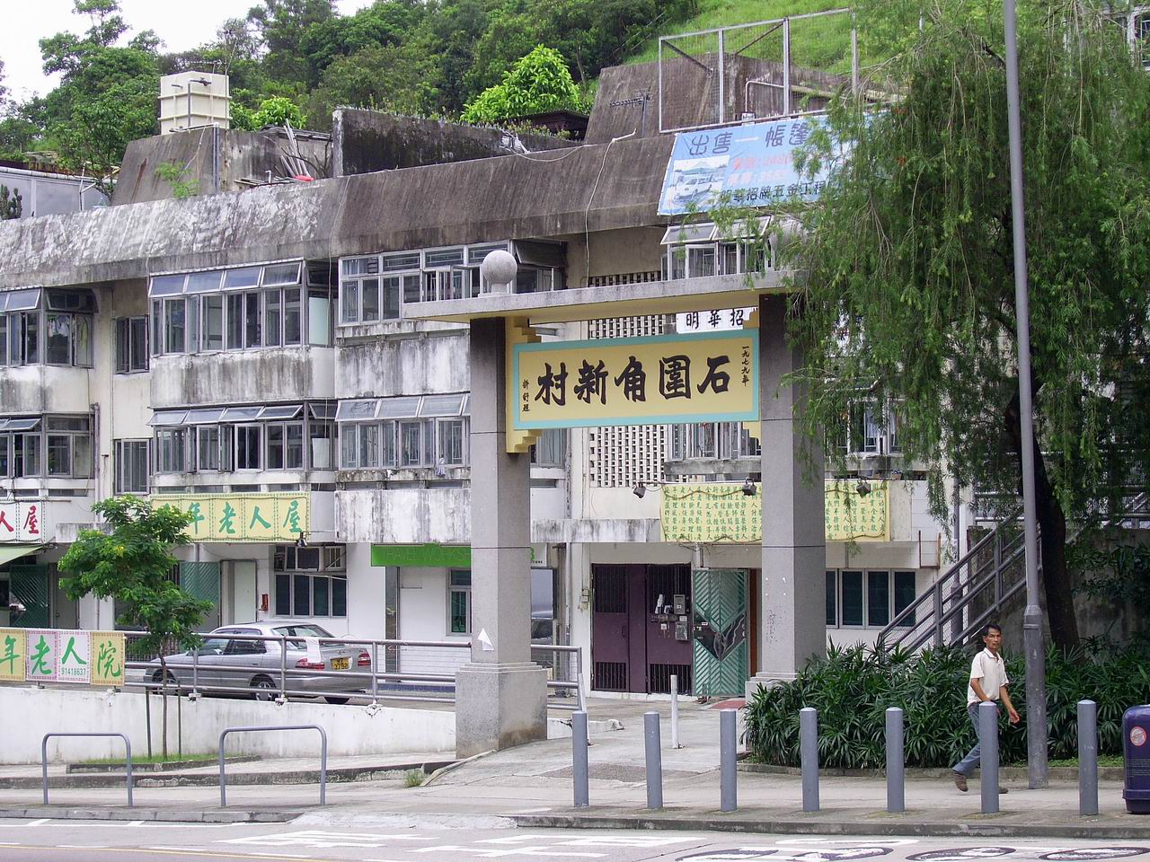 中文（香港）: 石圍角新村